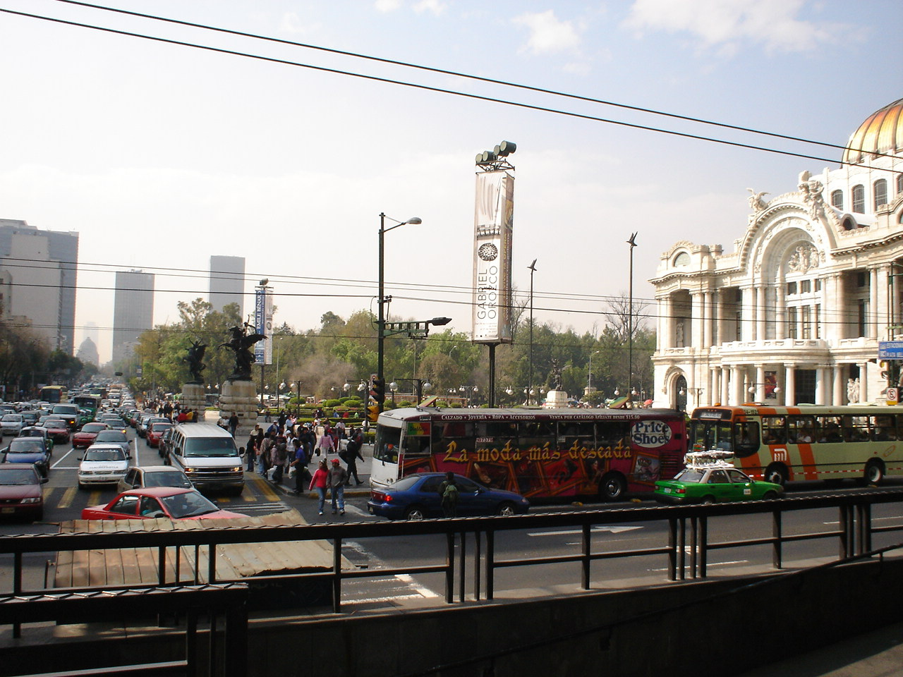 Palacio de Bellas Artes, a la izquierda la Avenida Juárez y a la derecha el Eje Central Lázaro Cárdenas en el Centro Histórico de la Ciudad de México, D.F., México.